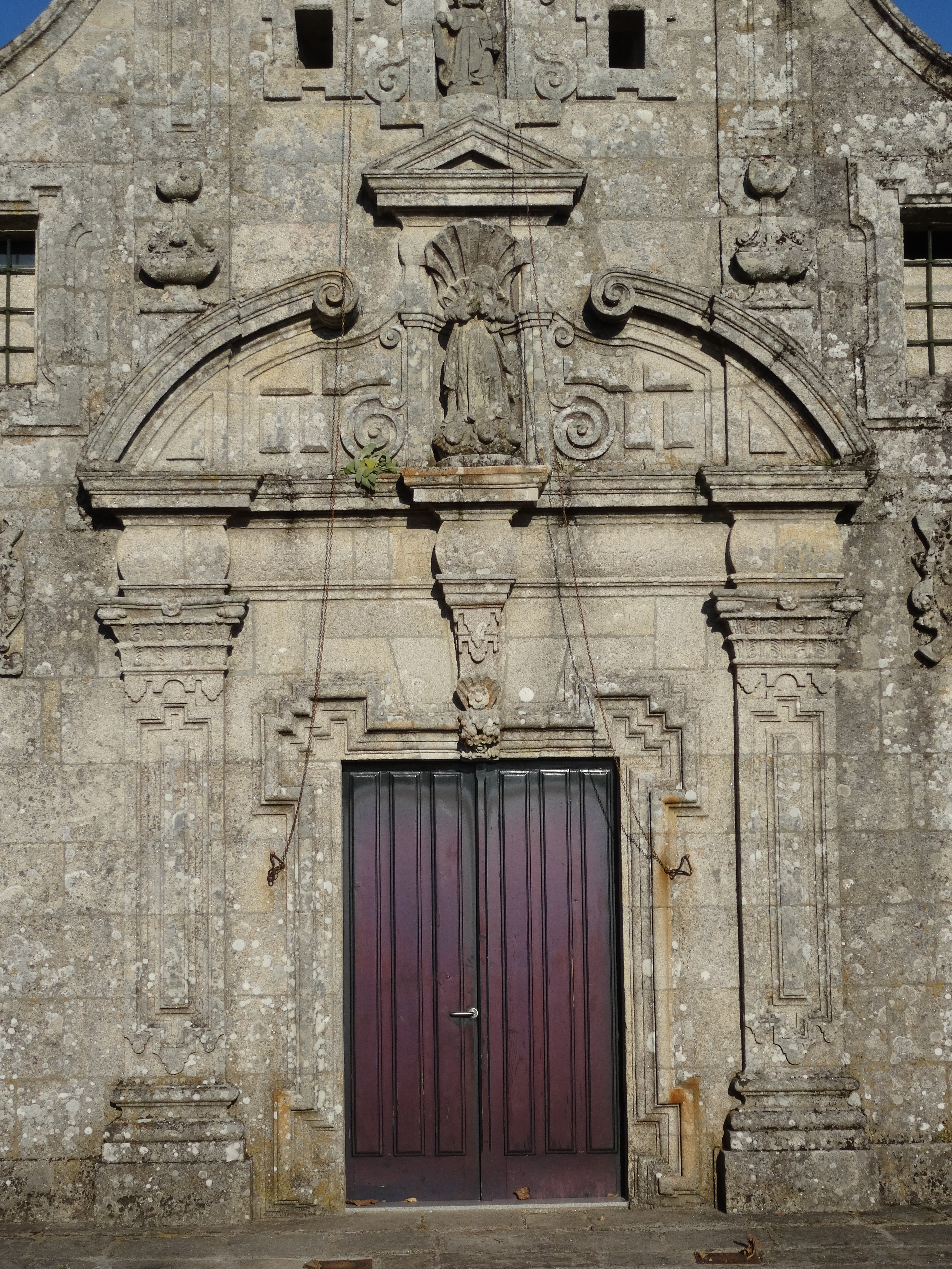 Ver título.